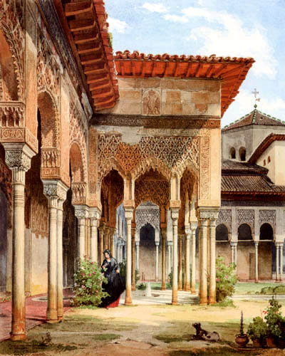 Parthie aus dem Löwenthore. Aquarell